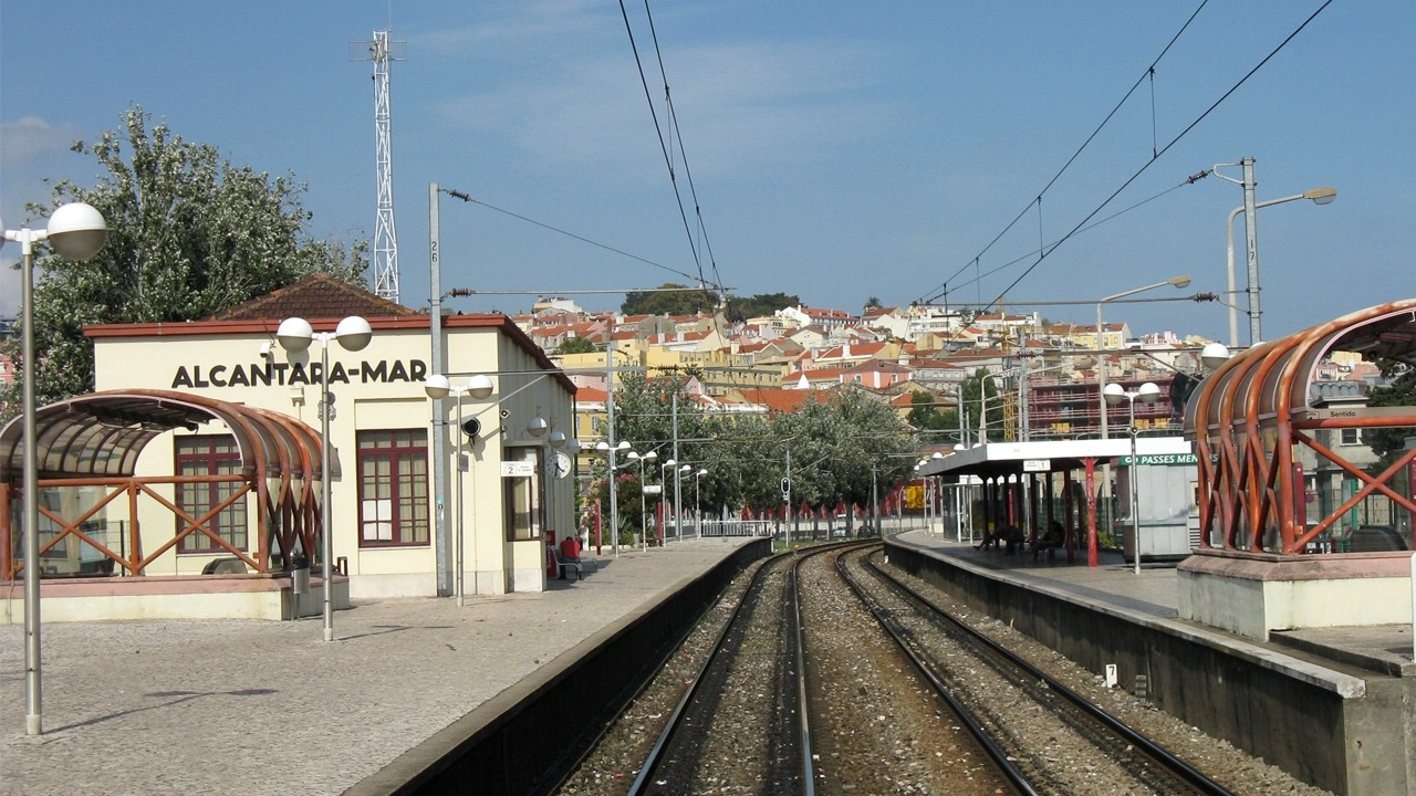 Foto tirada do interior da cabine